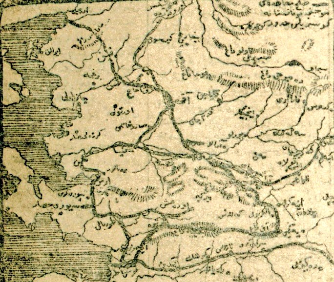 İleri gazetesinin 7 Temmuz 1920'de yayımladığı güncel Yunan ileri taarruz haritası